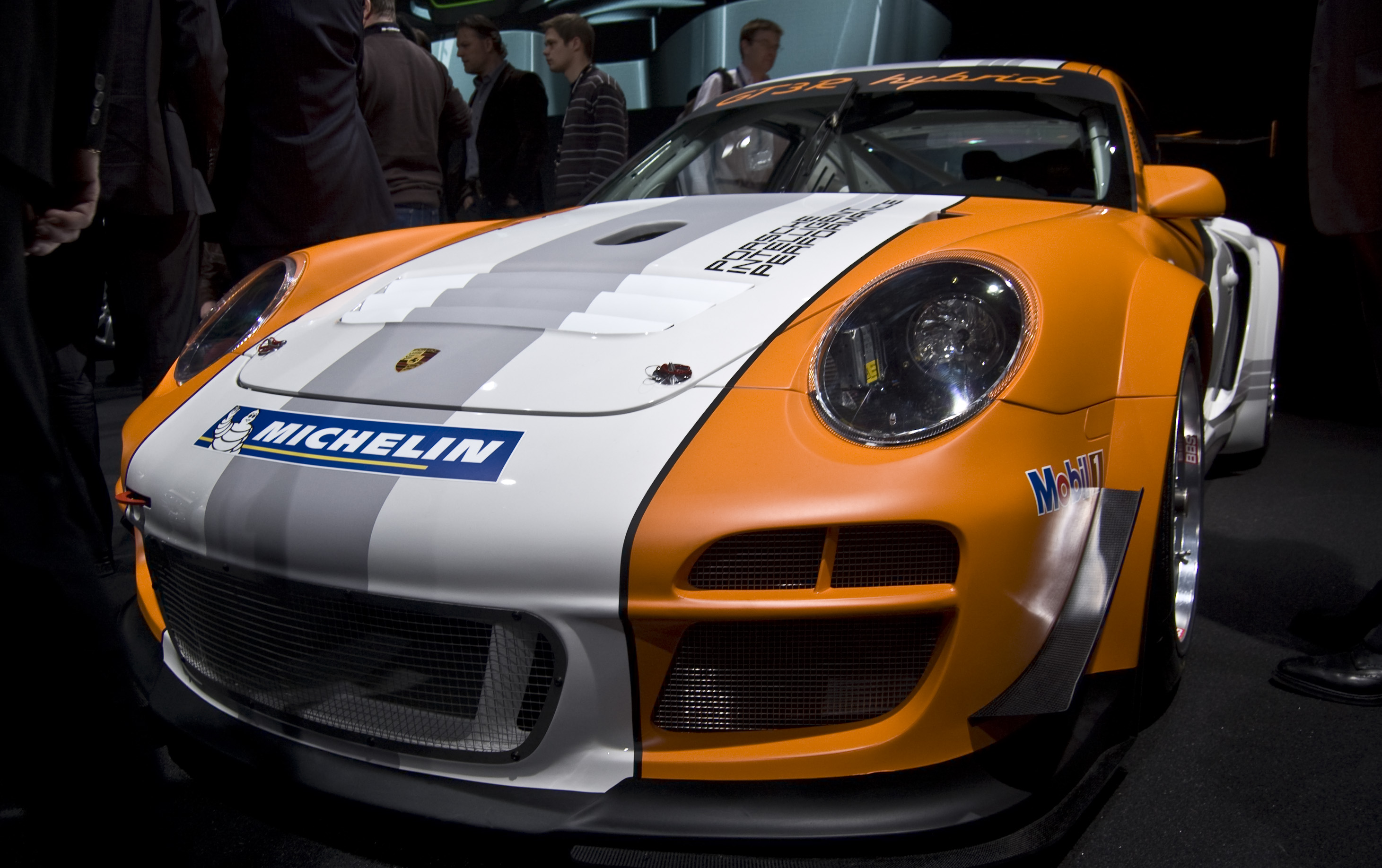 Porsche 911 GT3 R Hybrid en el Salón de Ginebra 2010.